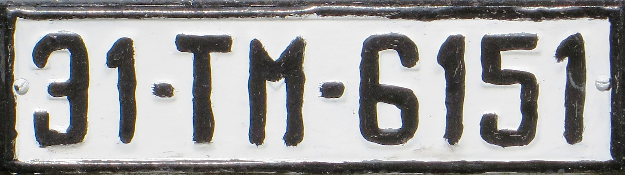 kentekenplaat uit Roemenië - Timișoara